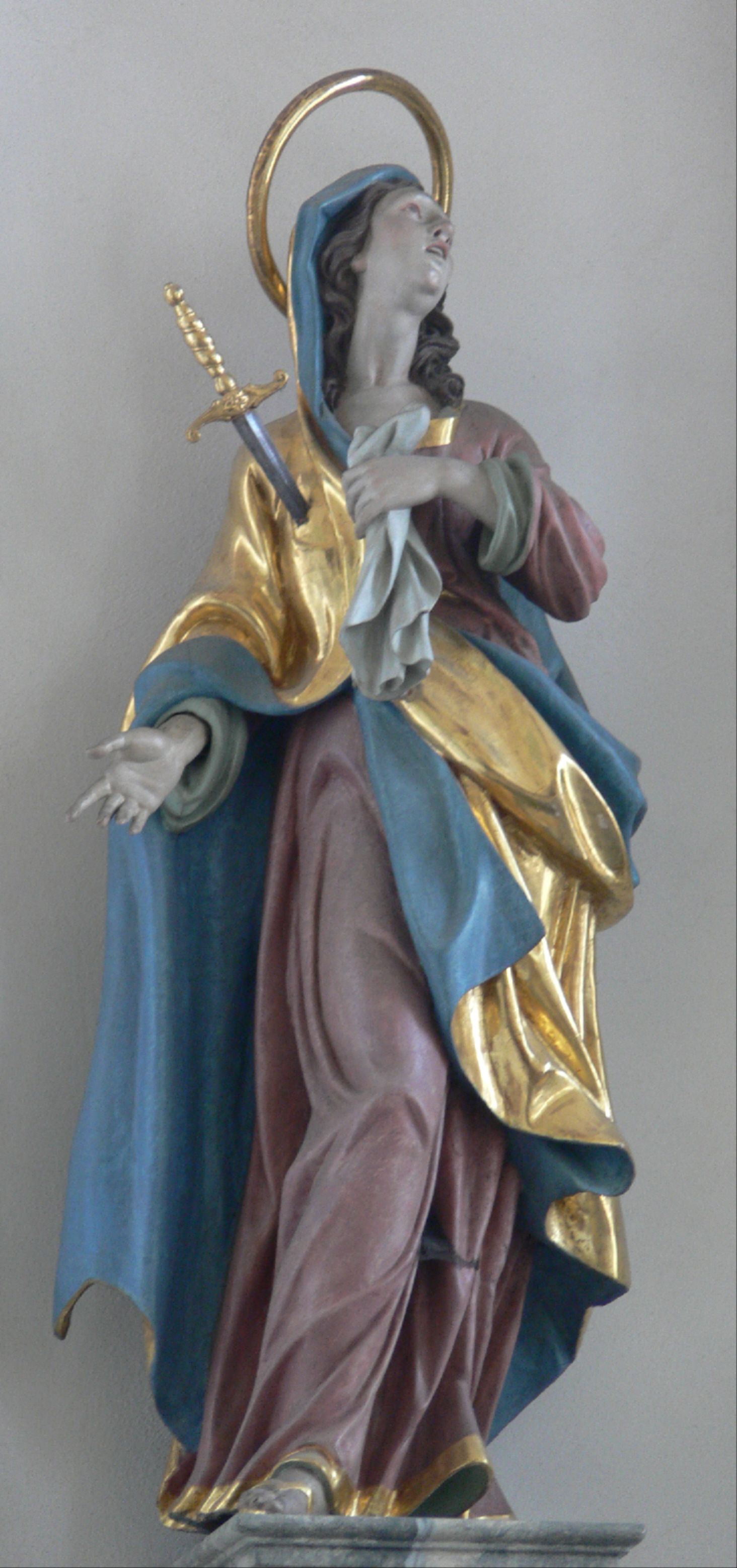 Pfarrkirche St. Gordianus und Epimachus, Aitrach, Landkreis Ravensburg Kreuzigungsgruppe: Mater dolorosa, Werkstatt des Johannes Ruez, um 1720 Johannes Ruez Alternative namesRuez, JohannDescription German-Austrian sculptor Date of birth/death17th century1762Location of birth/deathStrengen am ArlbergWurzachWork locationWurzach